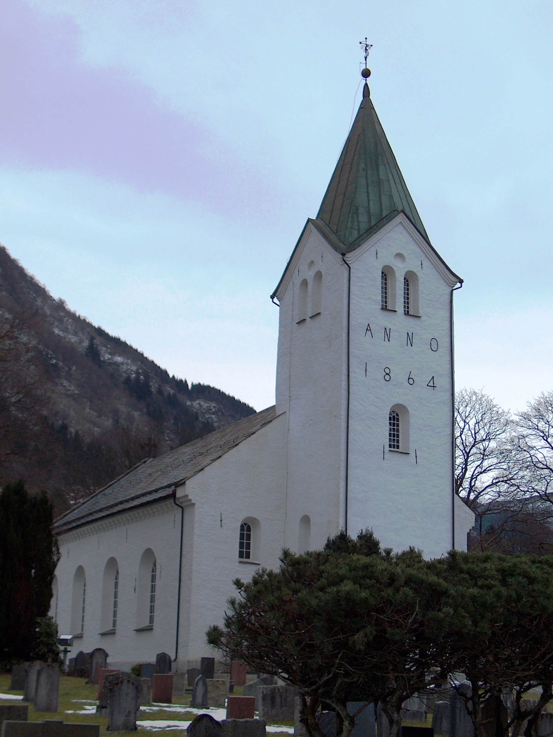 Arna kirke